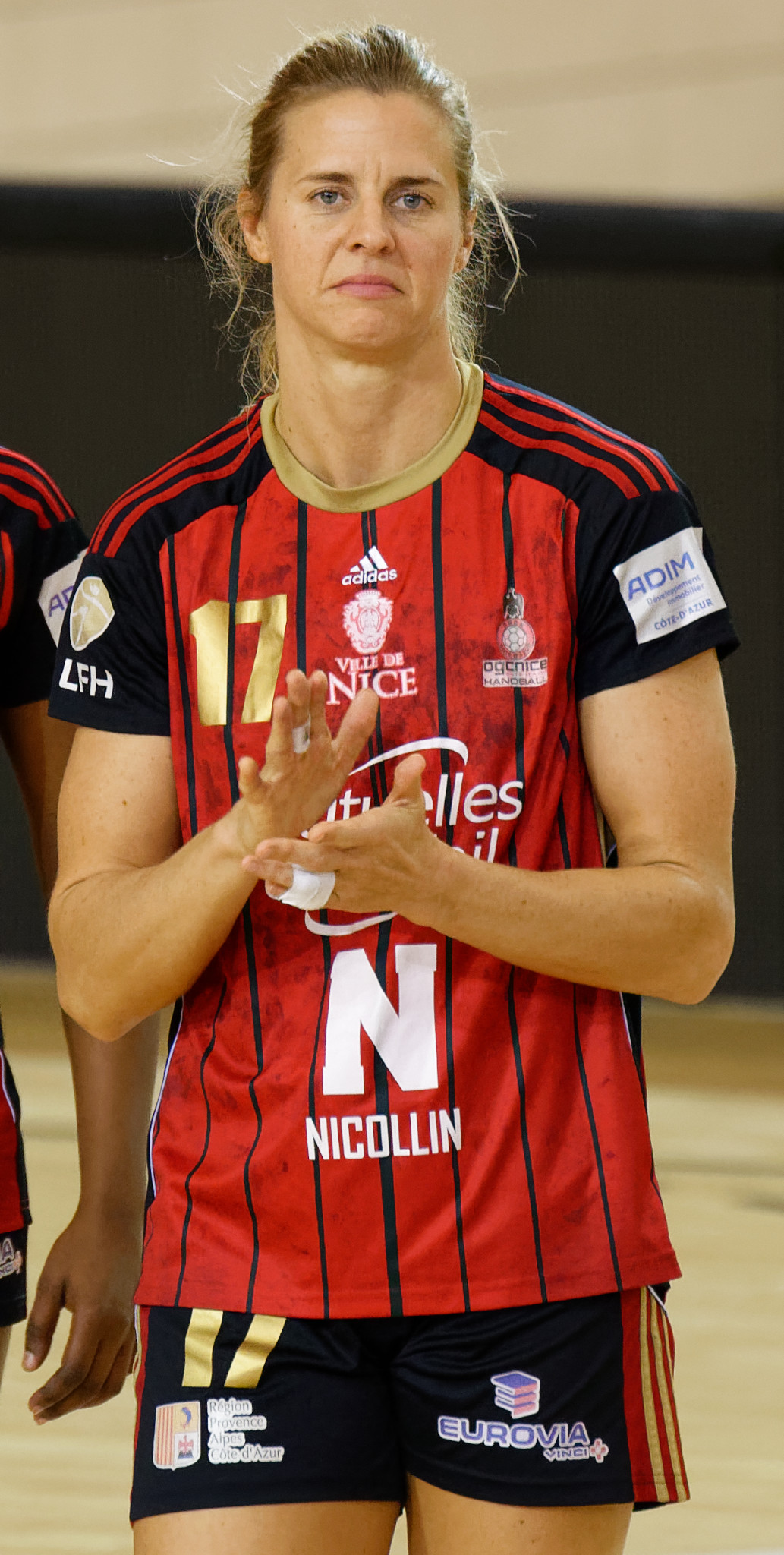 Rencontre Issy Paris Hand / OGC Nice. A Issy Les Moulineaux, le 8 novembre 2017.